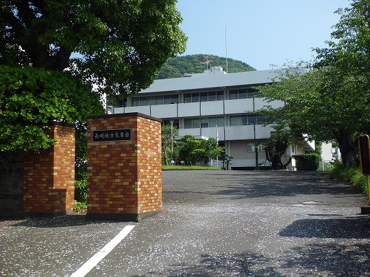 長崎地方気象台